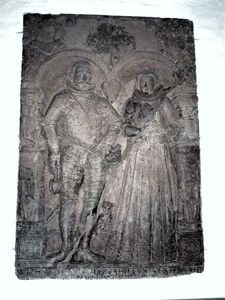 Rønninge Kirke i Danmark. Gravsten over Casper Markdanner og Sophie Oldeland